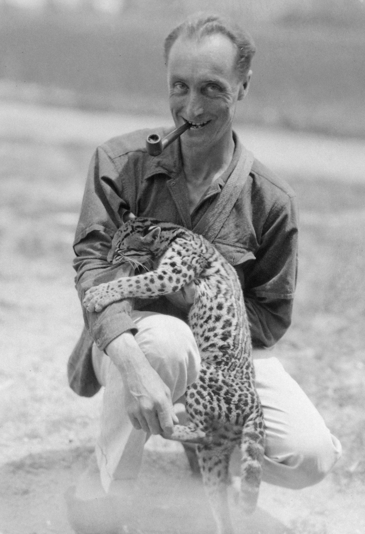 Photo de Robert de Wavrin jouant avec un jeune ocelot